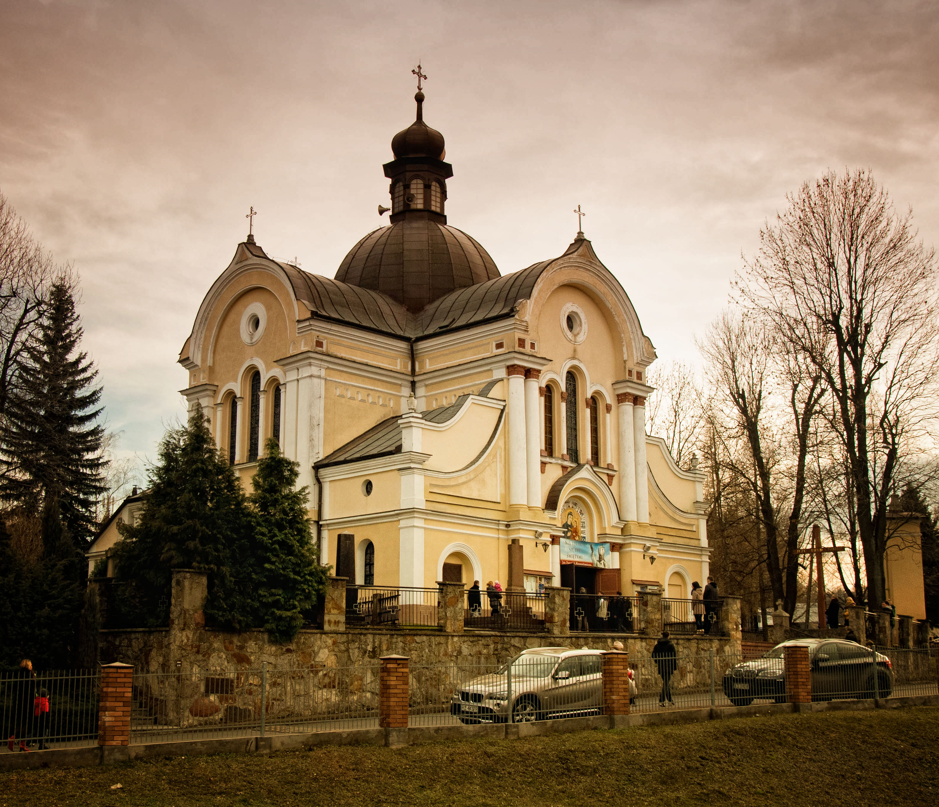 Rzeszów, cerkiew gr.-kat., ob. kościoła rzym.-kat. par. p.w. Wniebowzięcia NMP, 1889